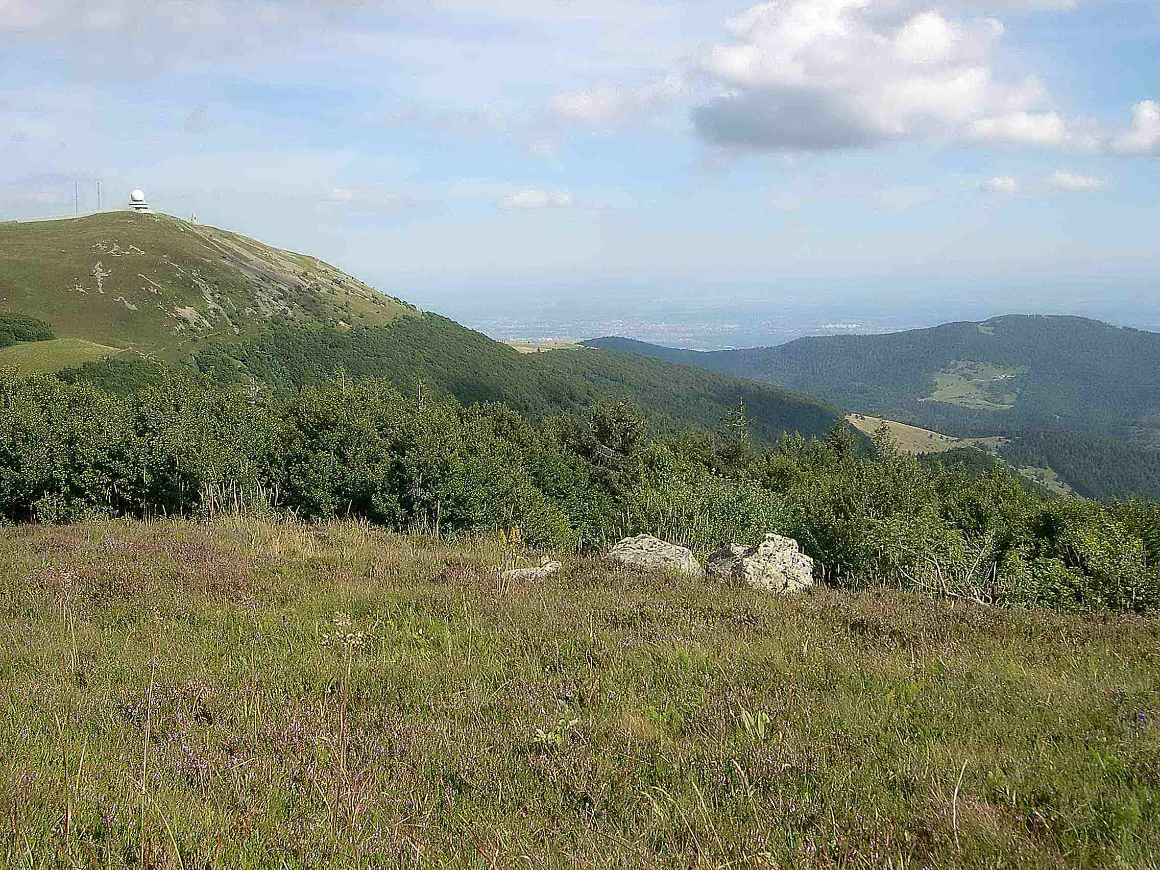 Blick vom Storkenkopf auf den Großen Belchen, das Massiv des Hartmannswillerkopfs (Bildmitte) und Molkenrain (rechts) sowie (im Bildhintergrund) die Oberrheinische Tiefebene mit Mülhausen.